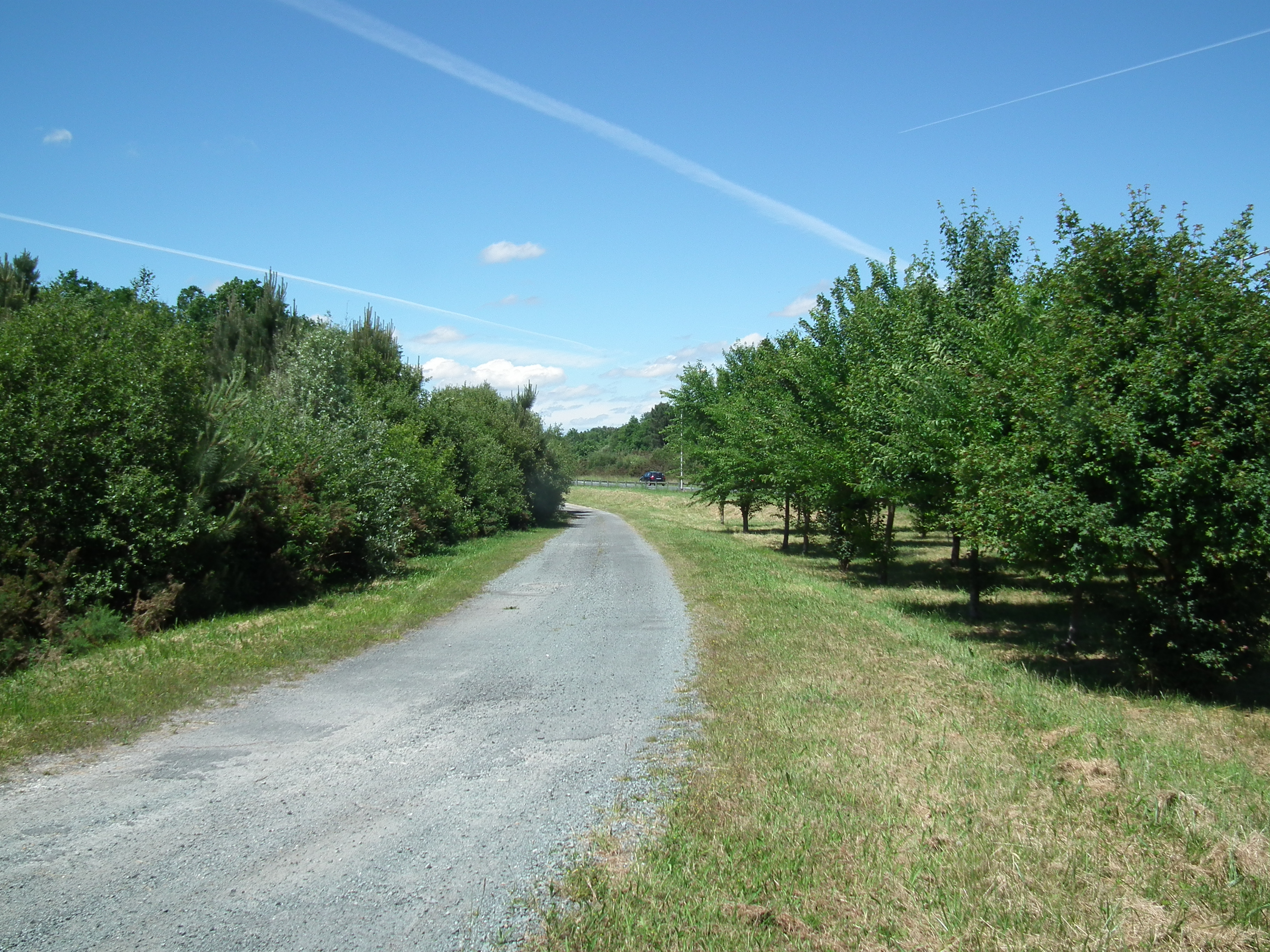 Piste cyclable à Etaules